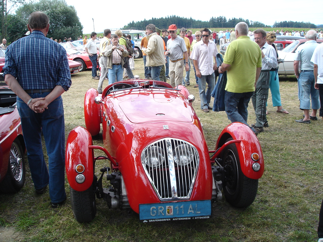 Front eines Healey Silverstone